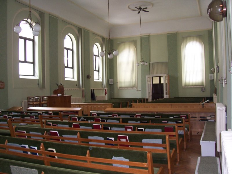 Валентина Водника 12, Нови Сад